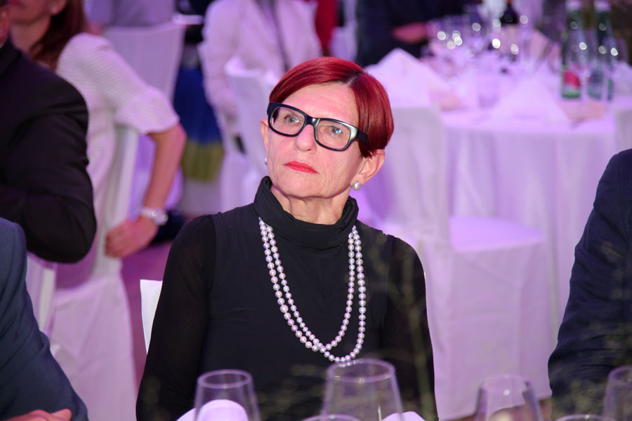 Univ.-Prof. Dr. Christine Mannhalter